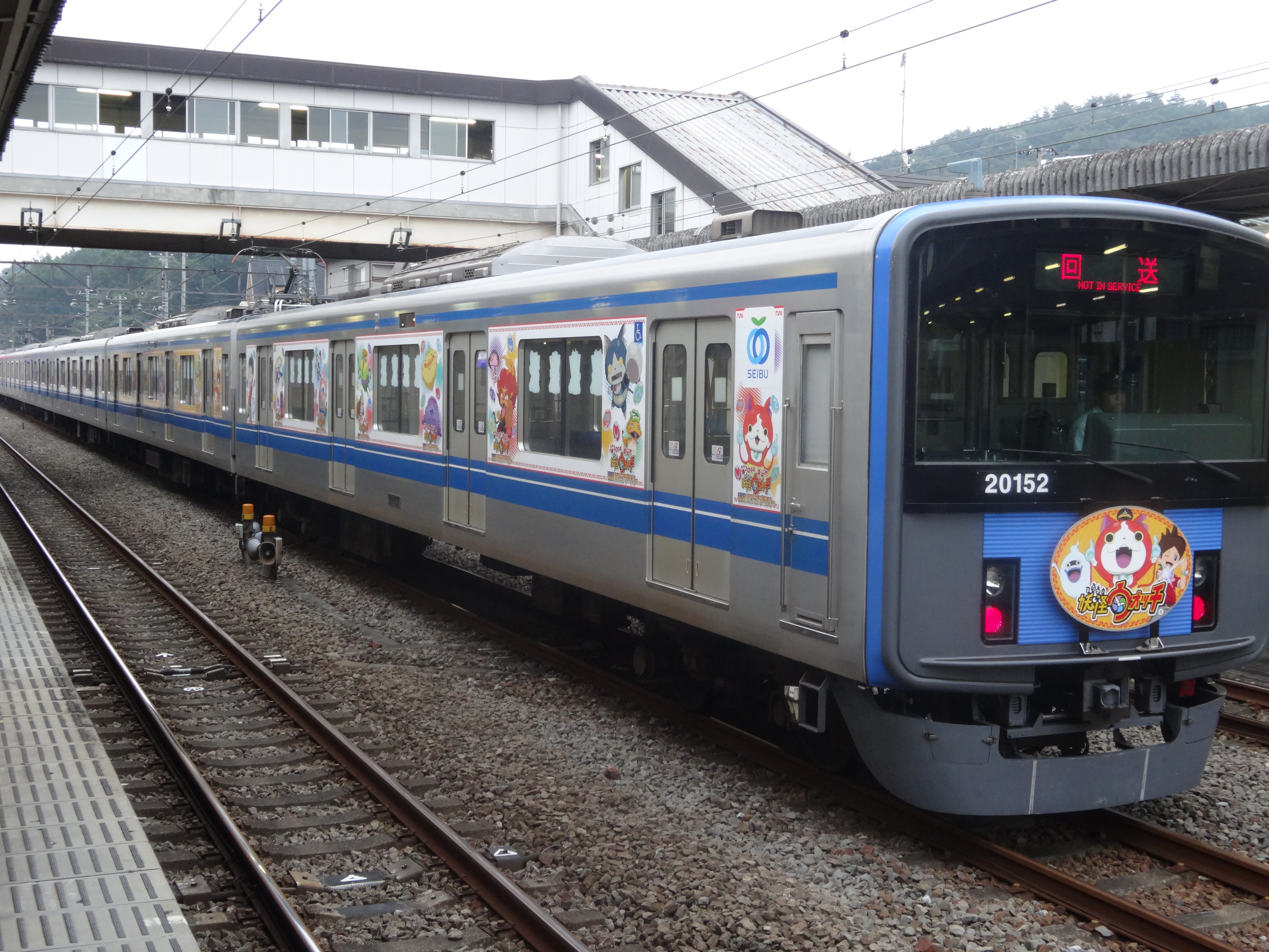 西武鉄道 20000系20152編成(8両編成)。『妖怪ウォッチ』のラッピングが施されている。仏子駅にて撮影。